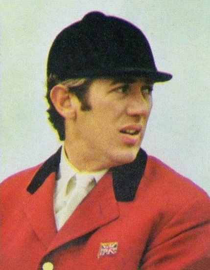 SPORT VEDETTES-PANINI 1974-Figurina n.95- BROOME - GR.BRETAGNA -EQUITAZIONE-Rec